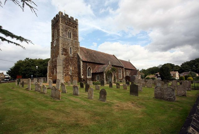 St Mary, Denver, Norfolk